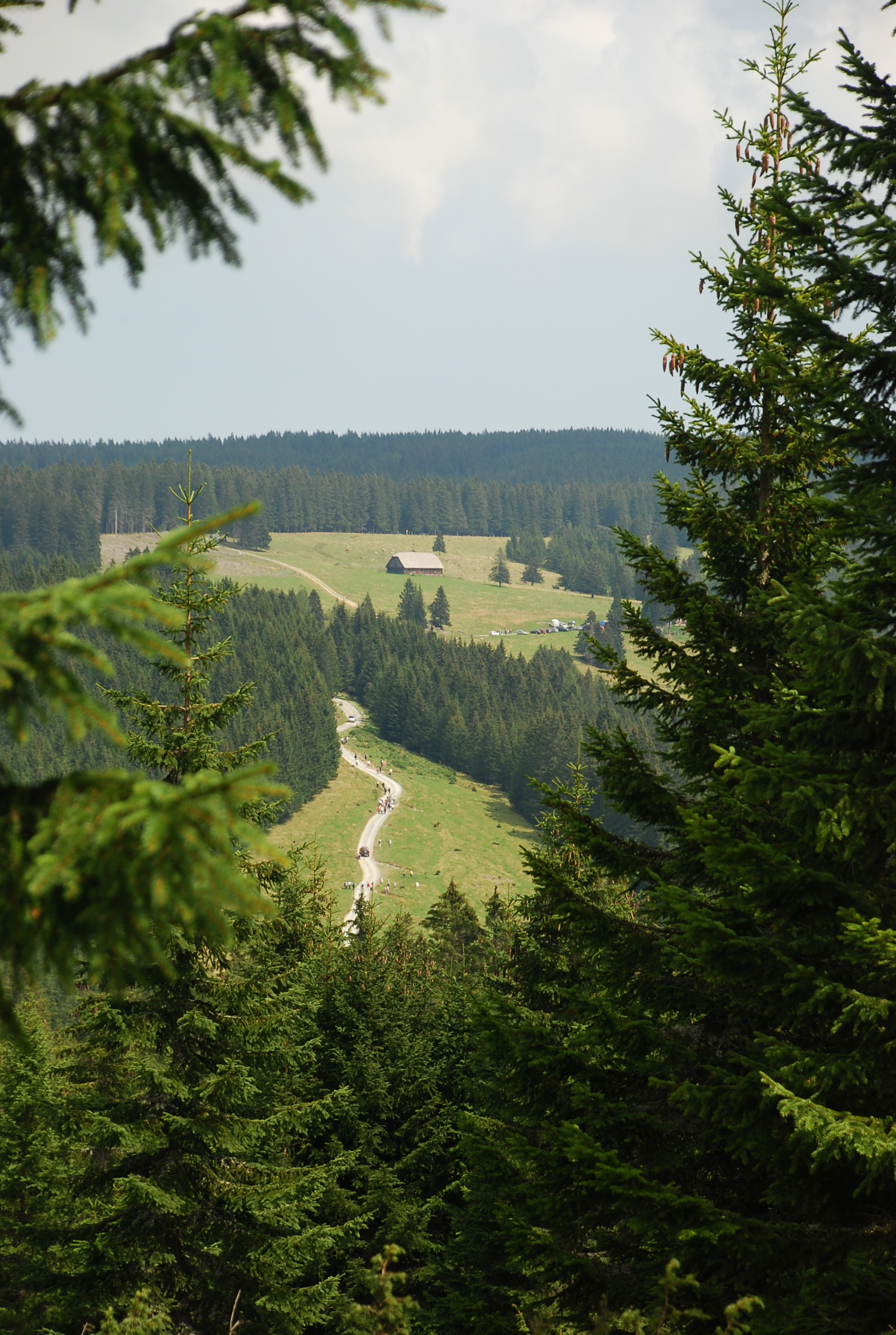 Freiländeralm Ausblick, im Hintergrund der Haltstall